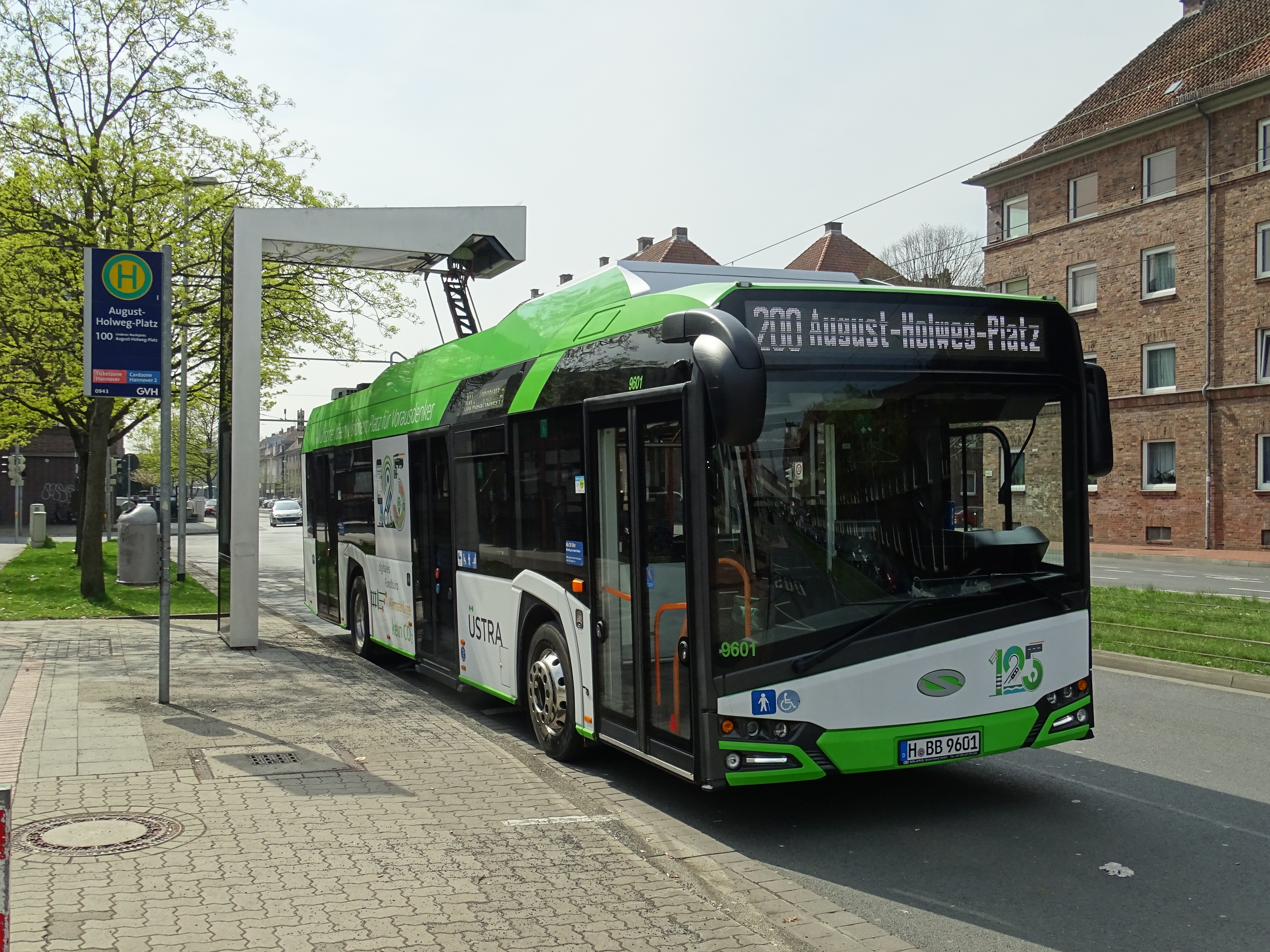 Solaris Urbino12 üstra Hannover